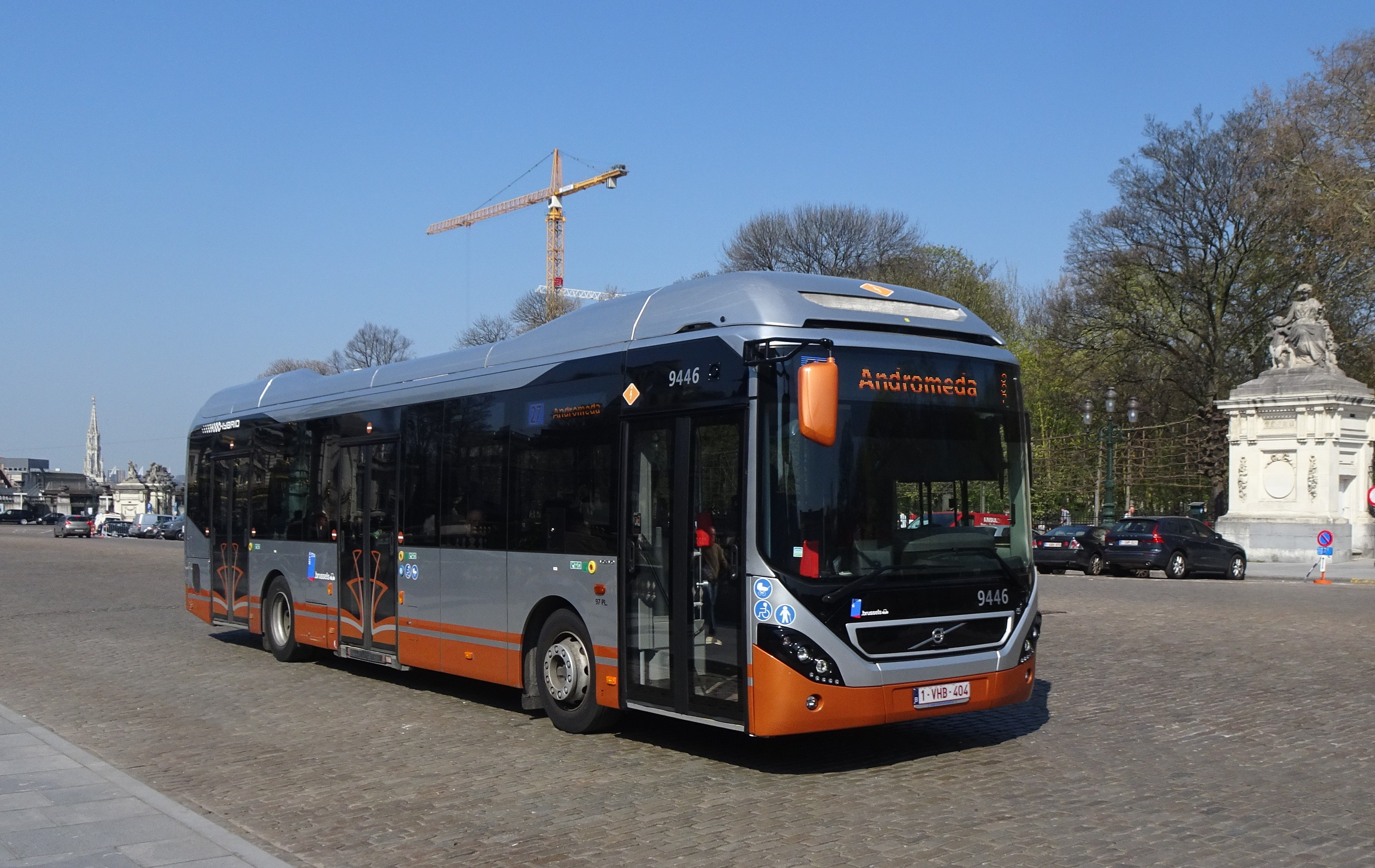 Autobus 9446 place des Palais